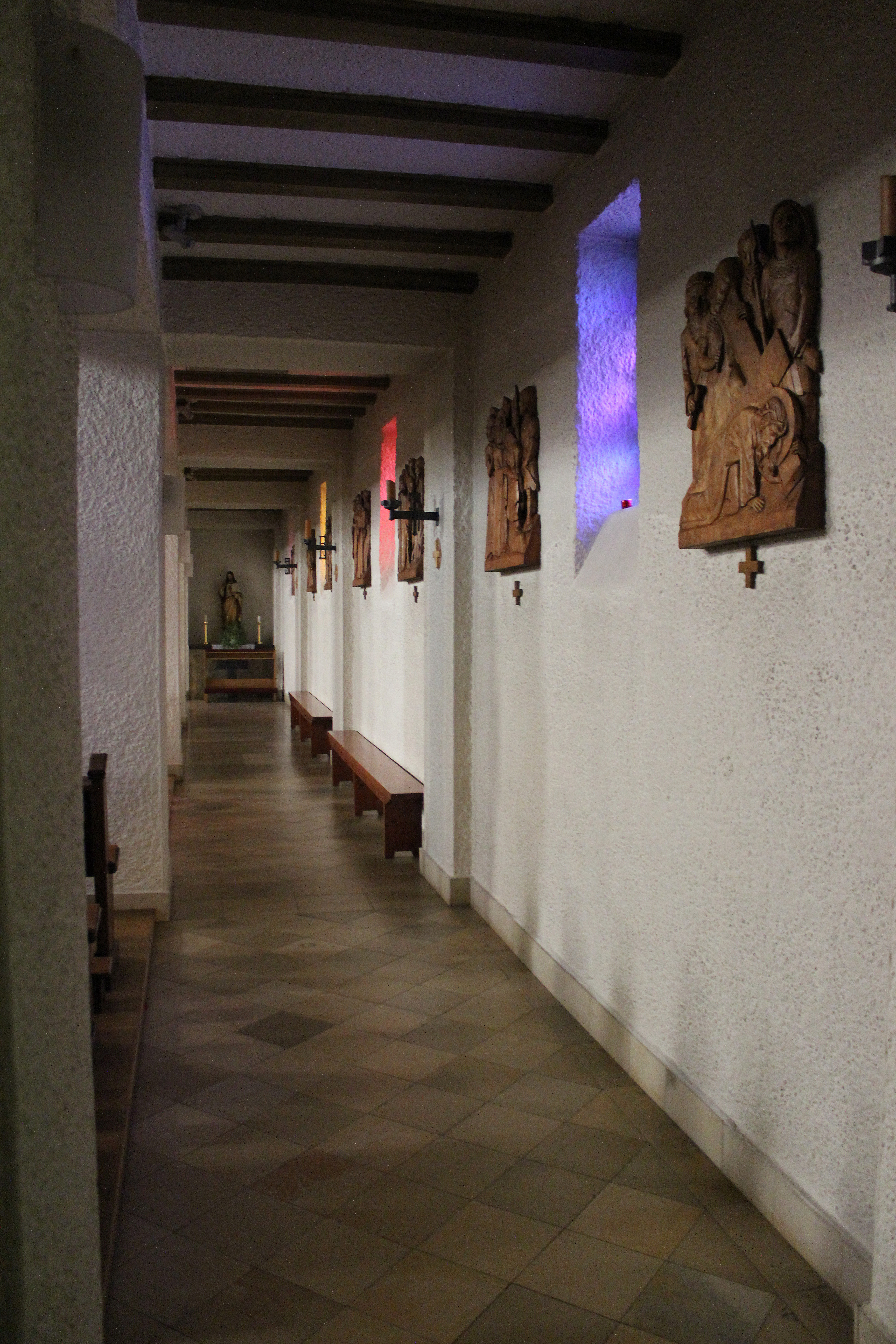 Seitenschiff der katholischen Pfarrkirche St. Marien in Schmelz, Landkreis Saarlouis, Saarland